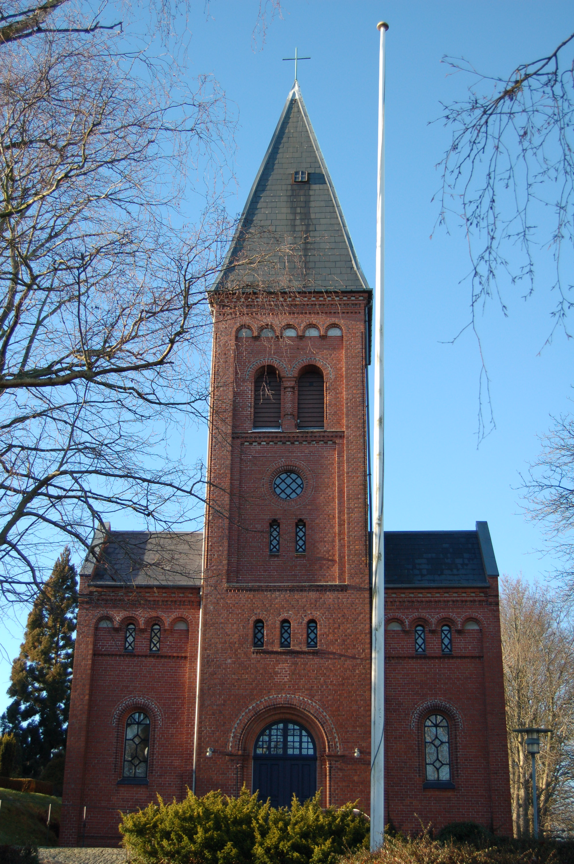 Church in Aarup, Denmark